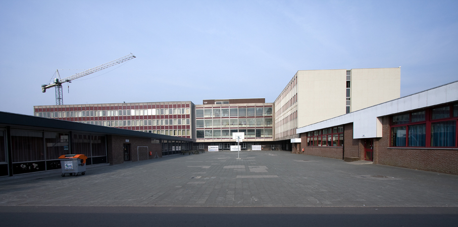 Sint-Lodewijkscollege Brugge